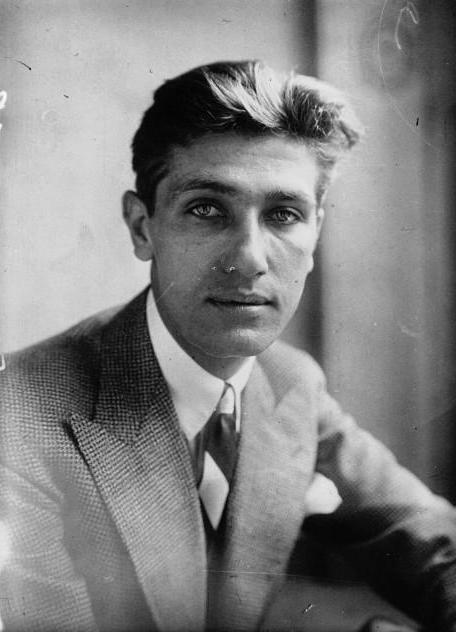 Charles Pélissier lors du Tour de France 1929